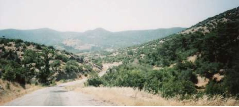 Yunt Dağı’nın doğu yamaçlarından görünüş.